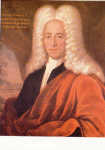 Johann_Melchior_Verdries_(1679-1736). Vertreter der Iatromechanik in Gießen (1720-1736)